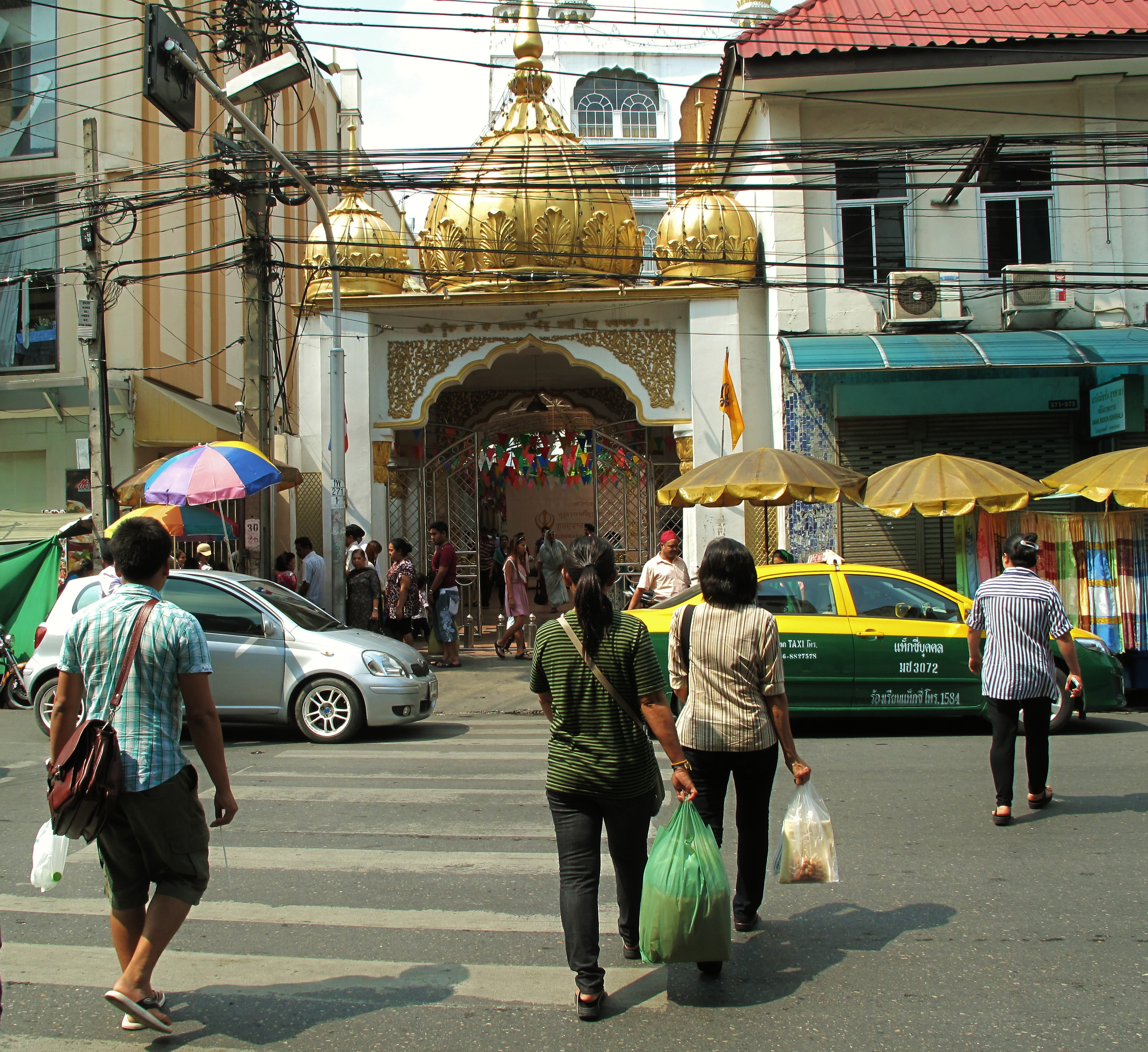 In Bangkok's Indian village